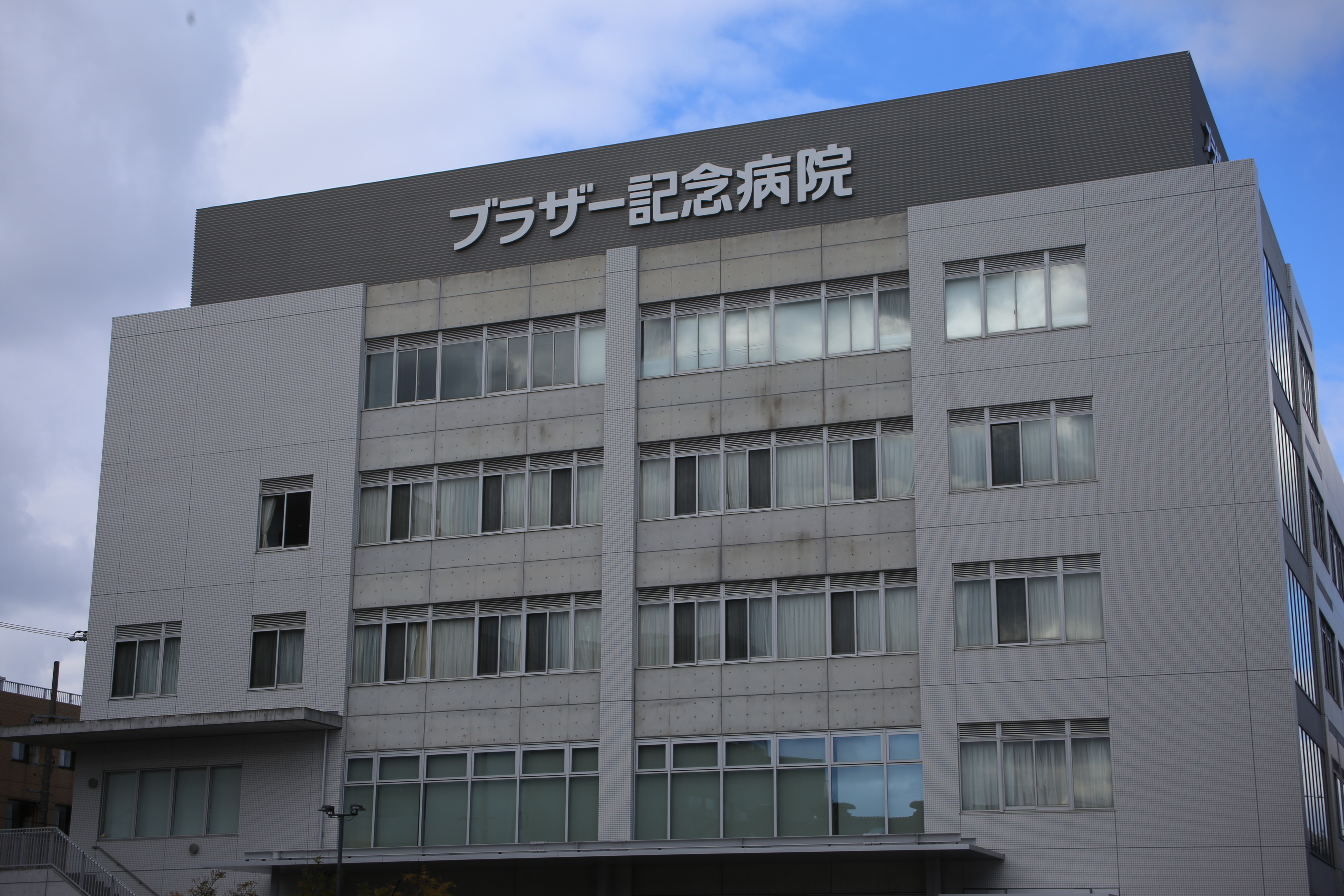 名古屋市瑞穂区塩入町のブラザー記念病院